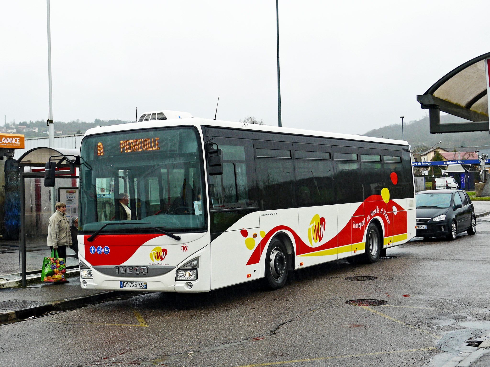 Crossway LE du réseau T'MM de Neuves-Maisons